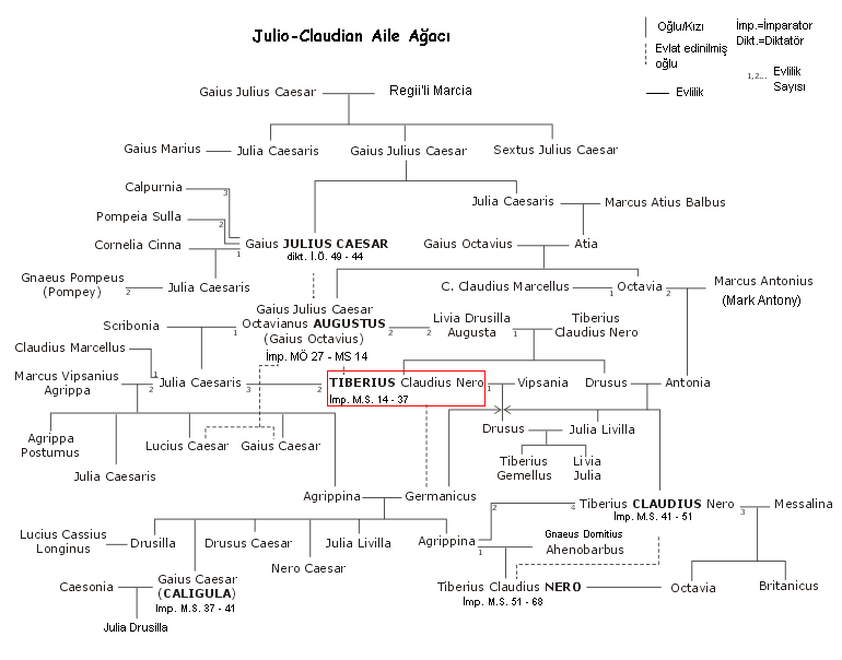 Julio-Claudian hanedani soy ağacı Tiberius